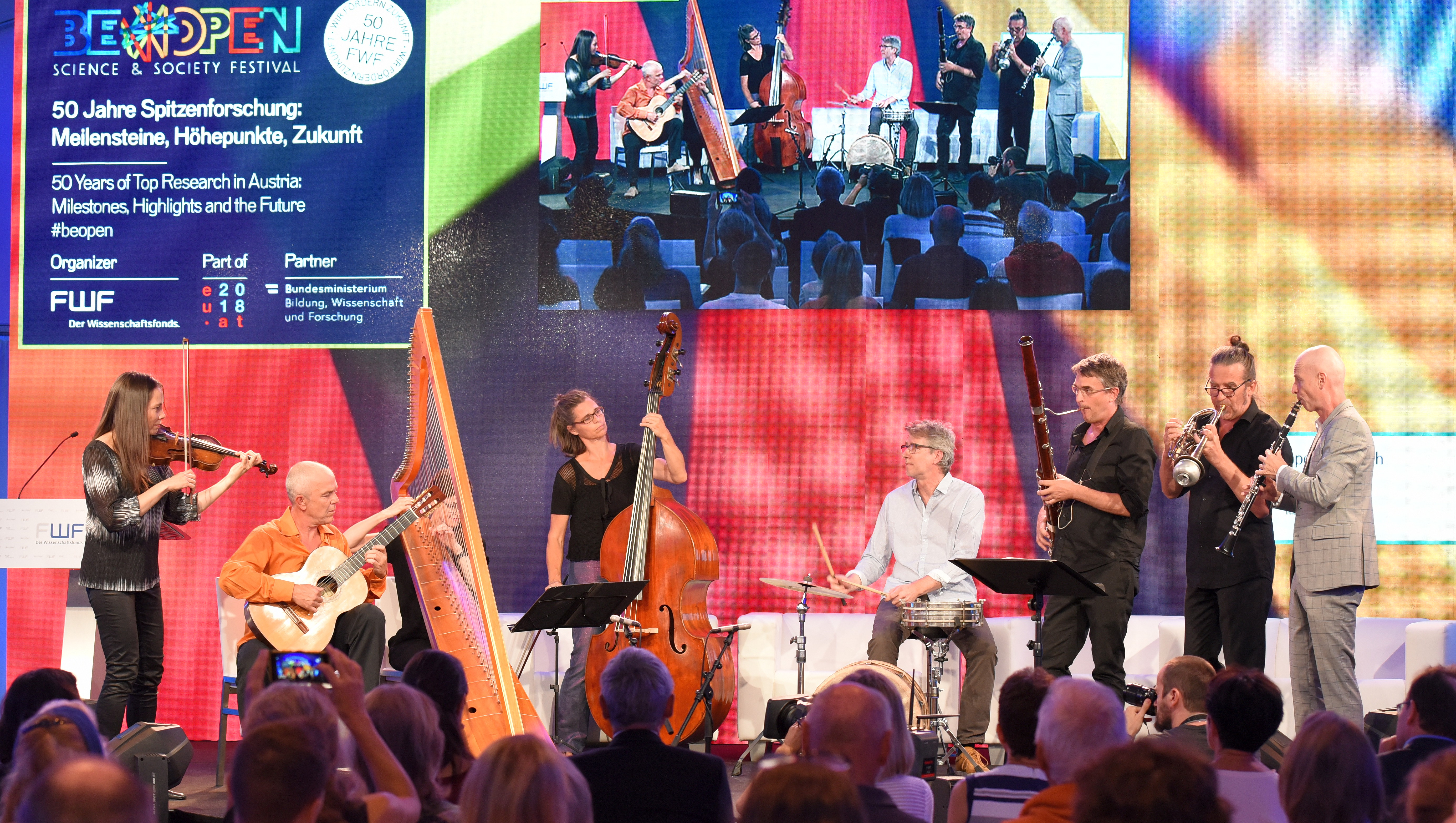 Ensemble "Die Knödel"